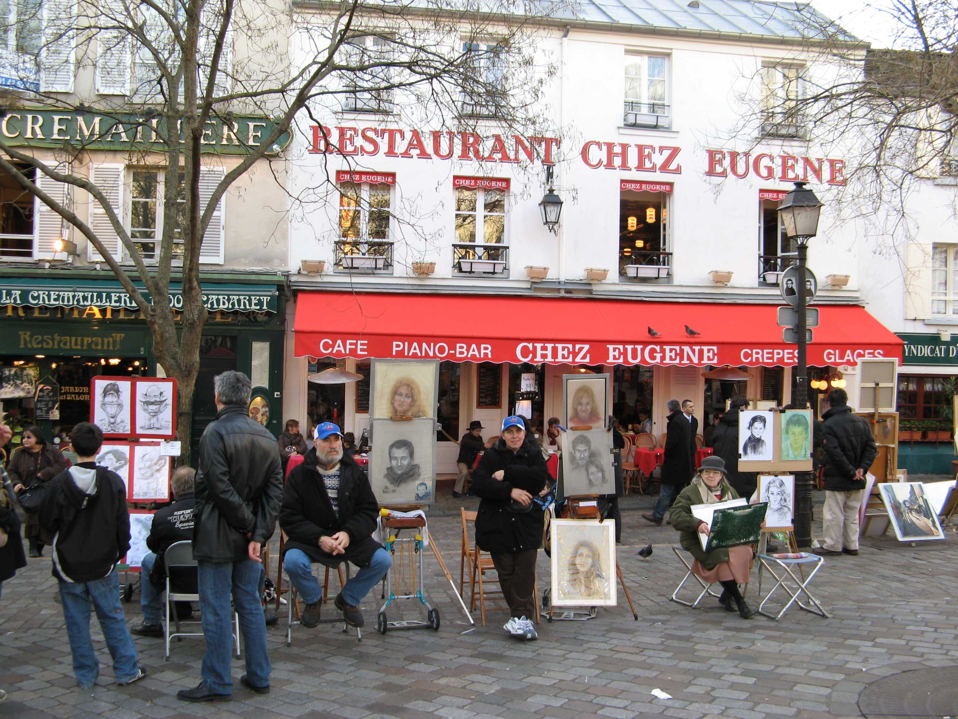 Chez Eugène, 17 Place du Tertre, 75018 Paris, France.